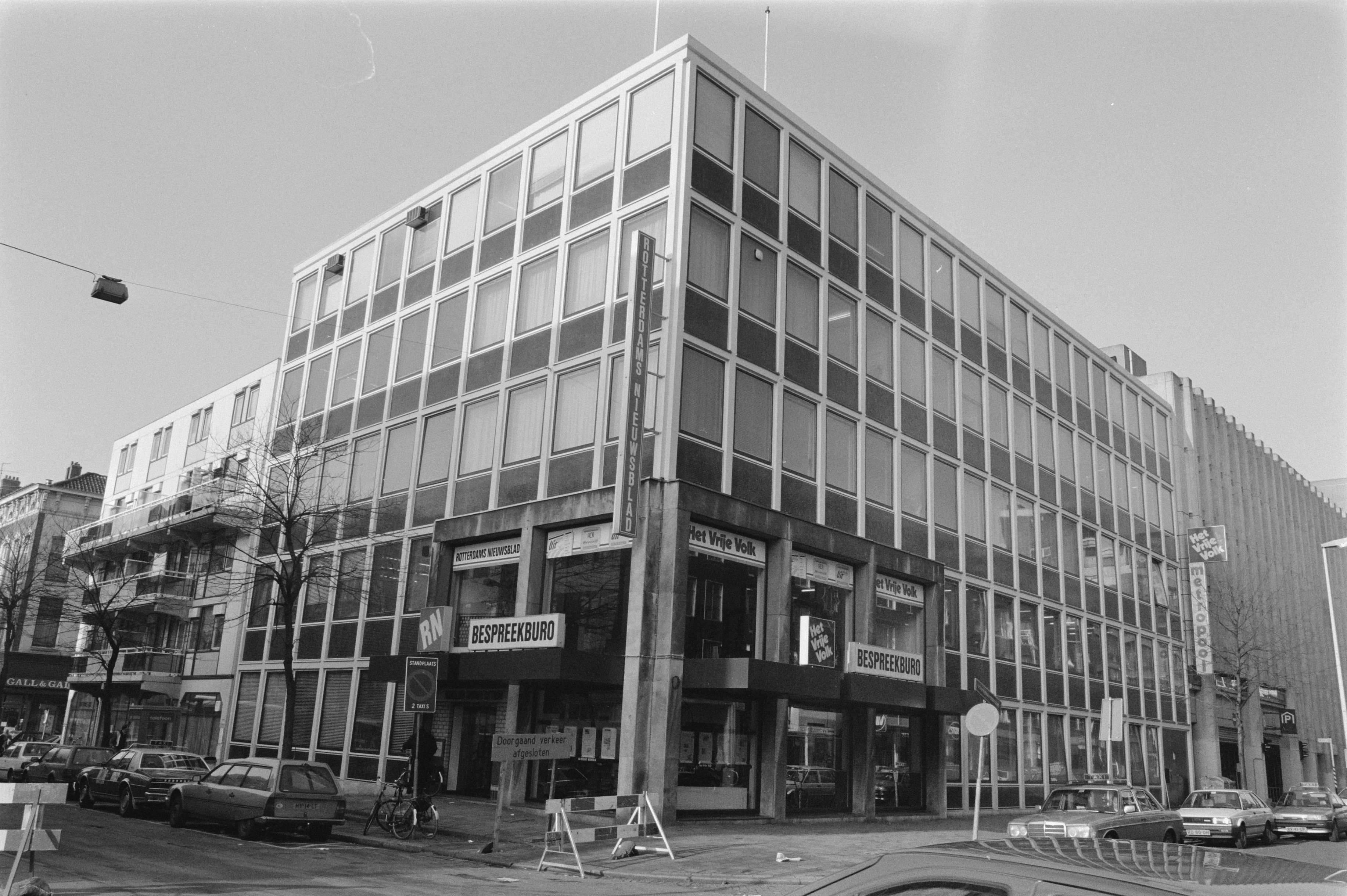 Collectie / Archief : Fotocollectie Anefo Reportage / Serie : [ onbekend ] Beschrijving : Gebouw van het Vrije Volk in Rotterdam Datum : 27 januari 1988 Locatie : Rotterdam, Zuid-Holland Trefwoorden : gebouwen Instellingsnaam : Vrije Volk Fotograaf : Croes, Rob C. / Anefo Auteursrechthebbende : Nationaal Archief Materiaalsoort : Negatief (zwart/wit) Nummer archiefinventaris : bekijk toegang 2.24.01.05 Bestanddeelnummer : 934-1777